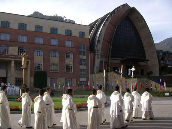 colegio Jordan De Sajonia, en Bogotá Colombia, durante la celebración del Capítulo General de la Orden de Predicadores